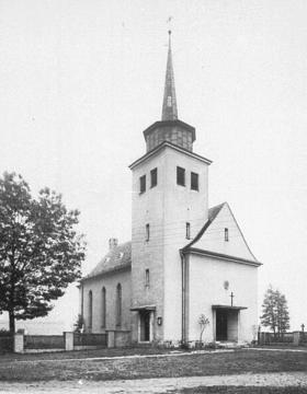 Die neue Kirche in Merzdorf bei Uhyst wurde 1934/1935 erbaut und in Folge des Ortsabbruchs in den Jahren 1977–1979 wieder abgebrochen.